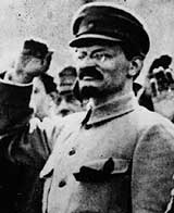 Leon Trotsky saluting, 1919/1920